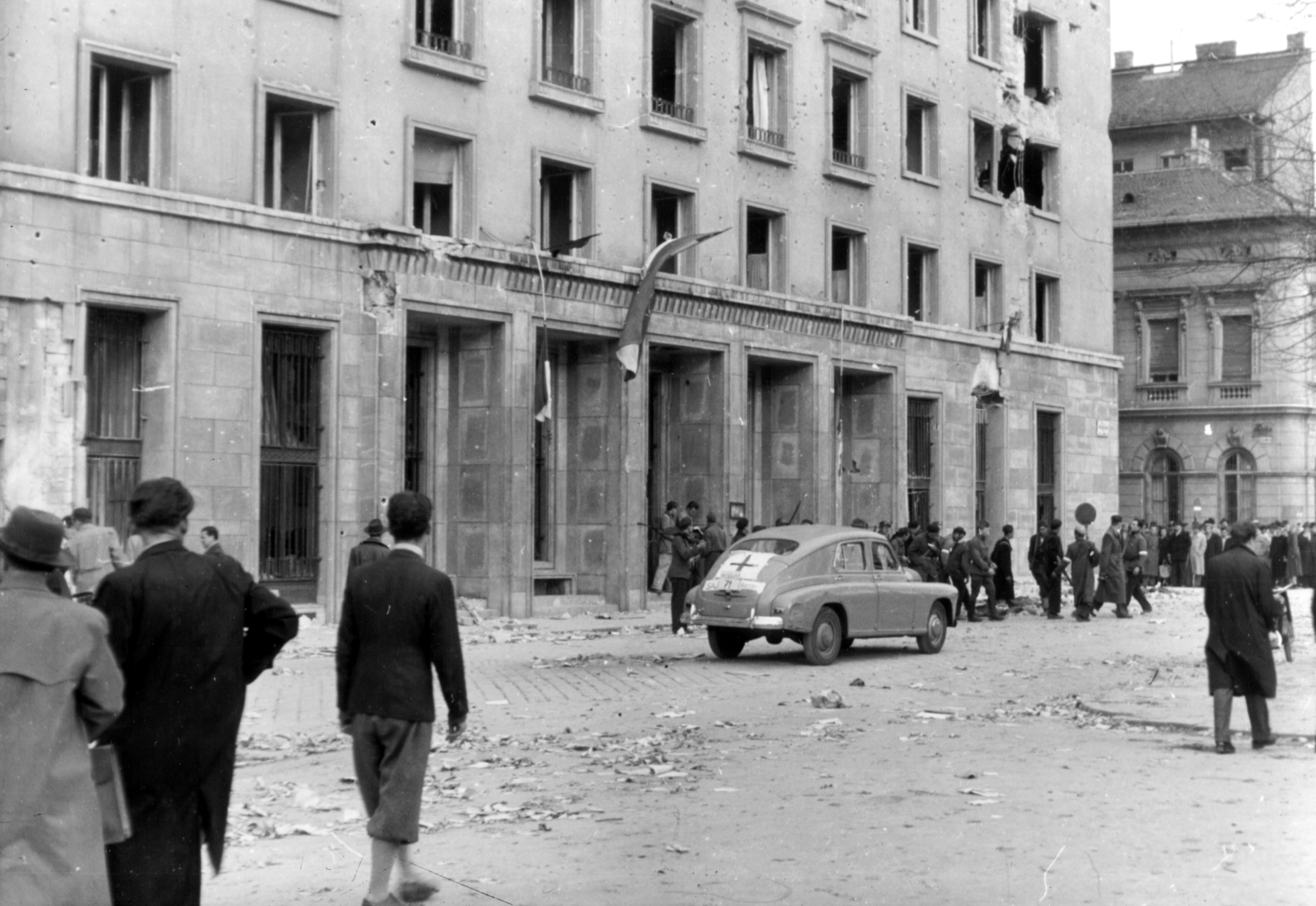 1956 Köztársaság tér 26., a Budapesti Pártbizottság székháza.